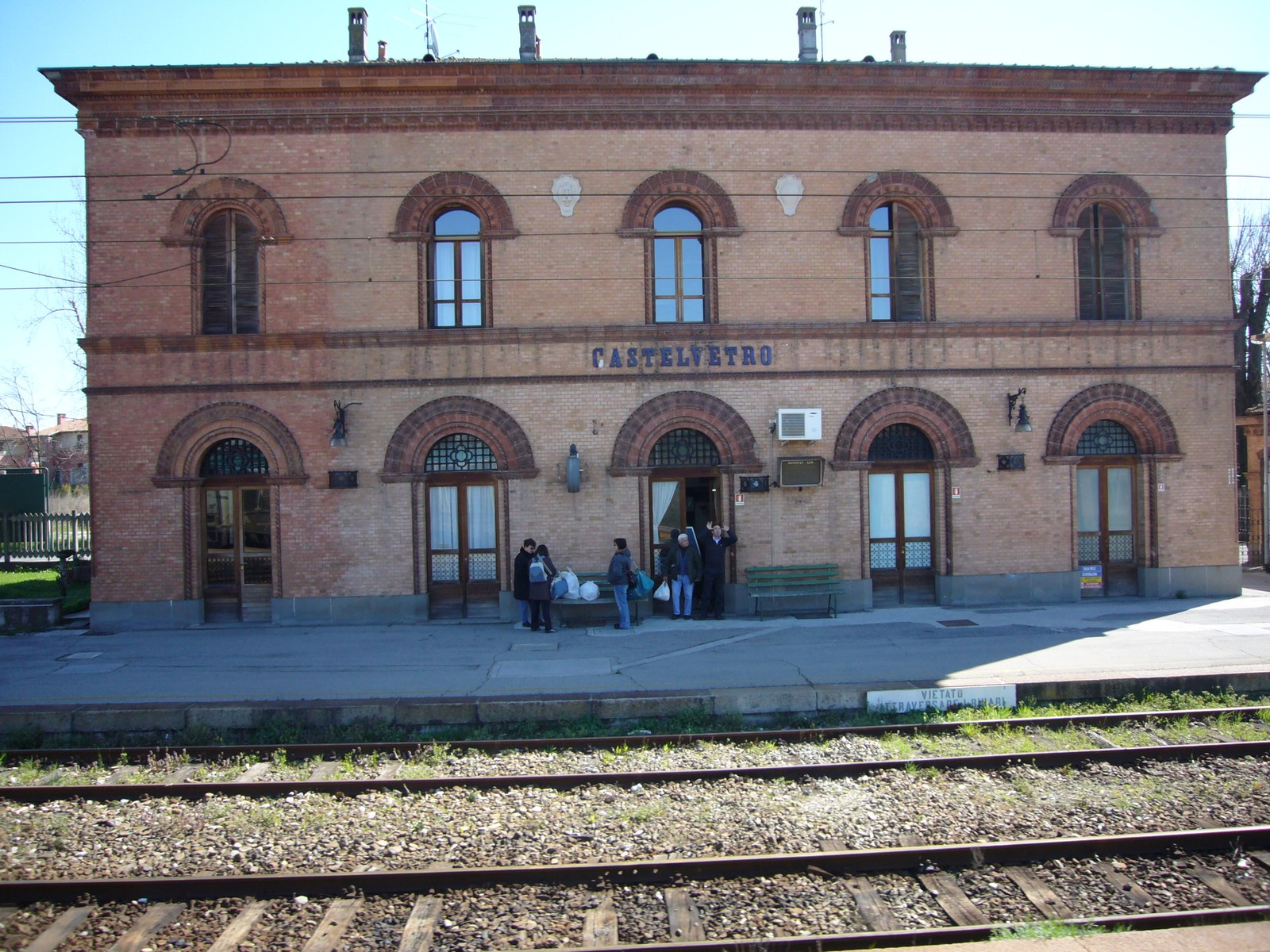 Stazione ferroviaria di Castelvetro Piacentino, Piacenza, Italia